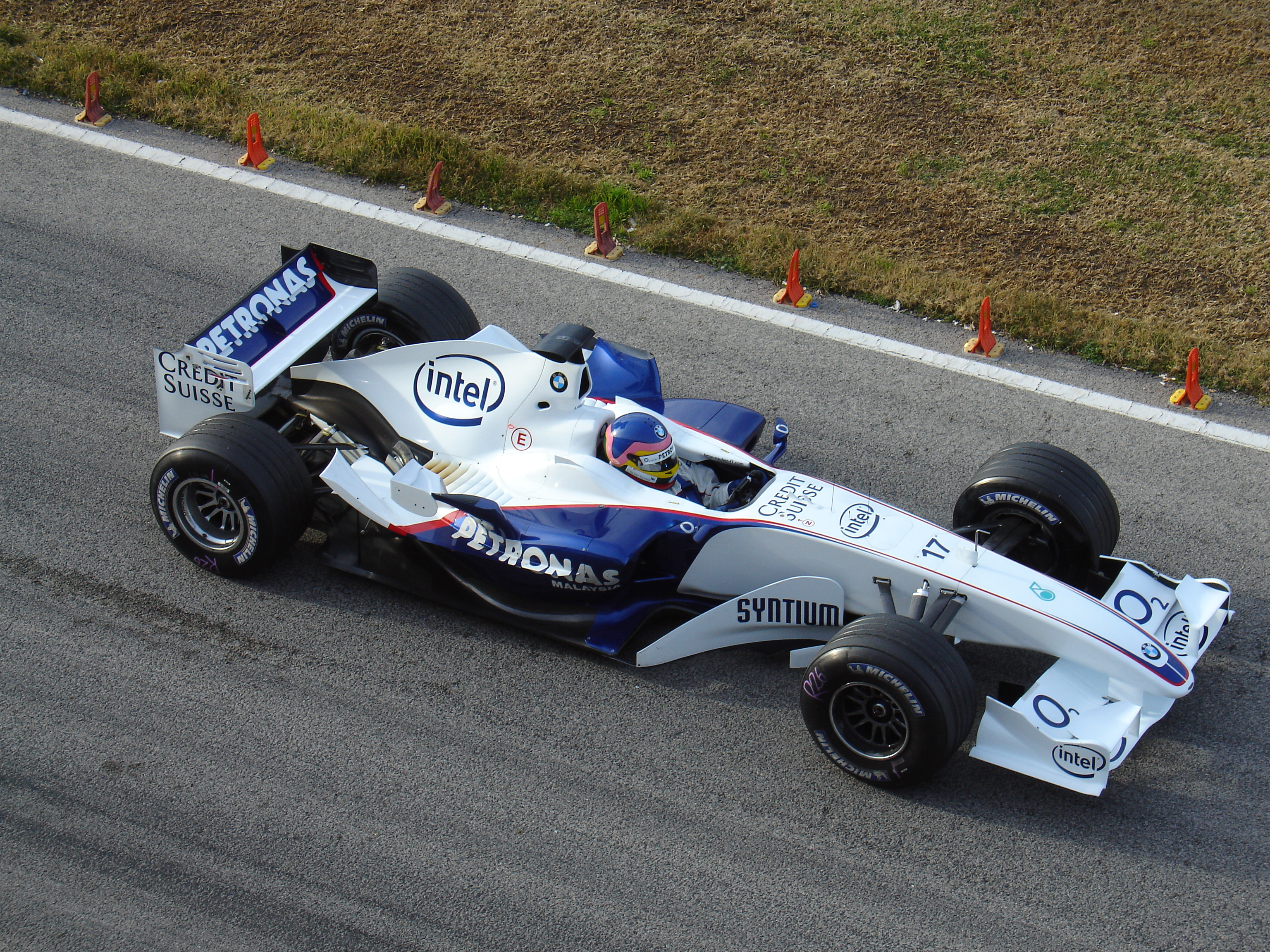 Jaques Villeneuve at Cheste Circuit (Valencia)